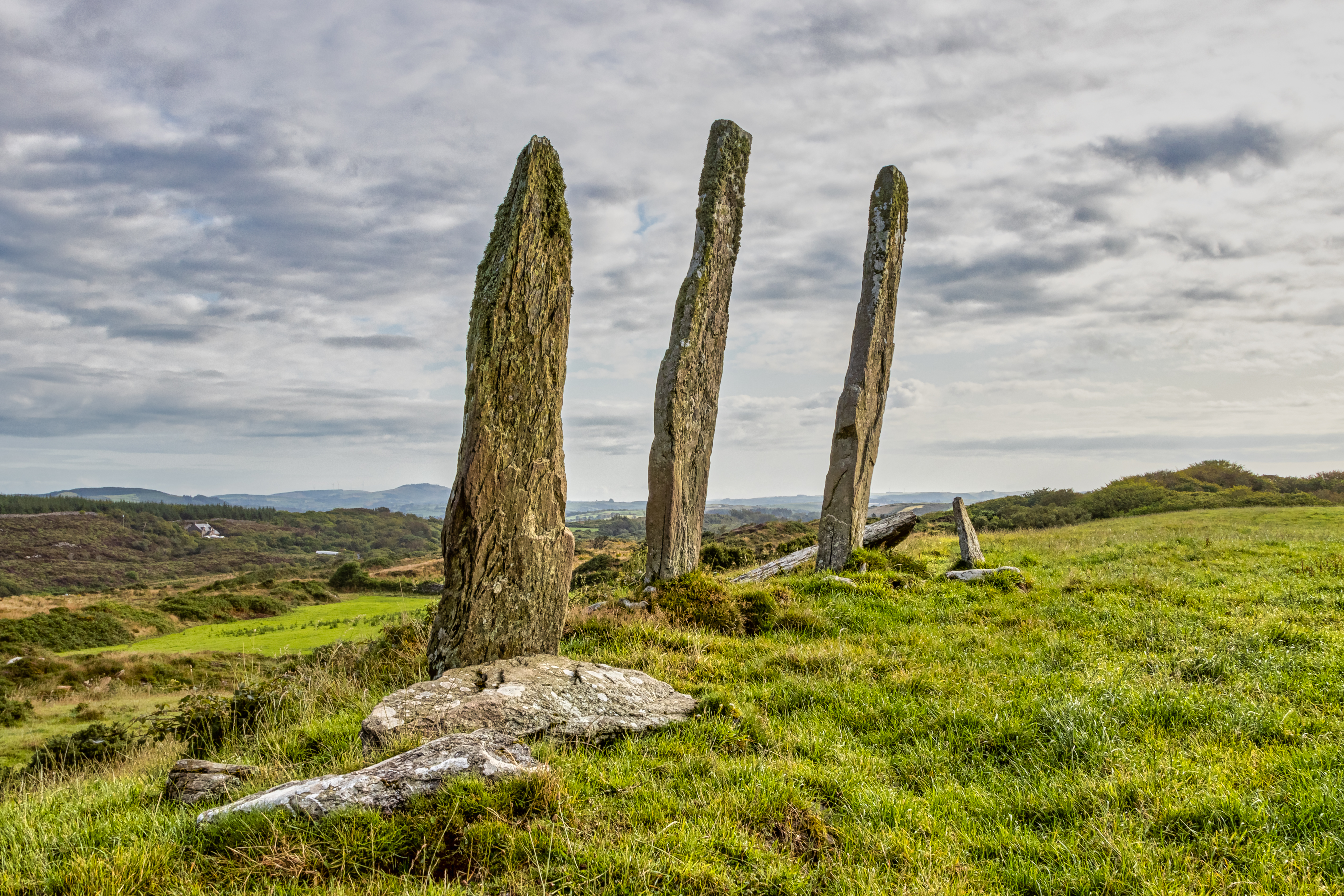 Steinreihe von Gurranes bei Skibbereen